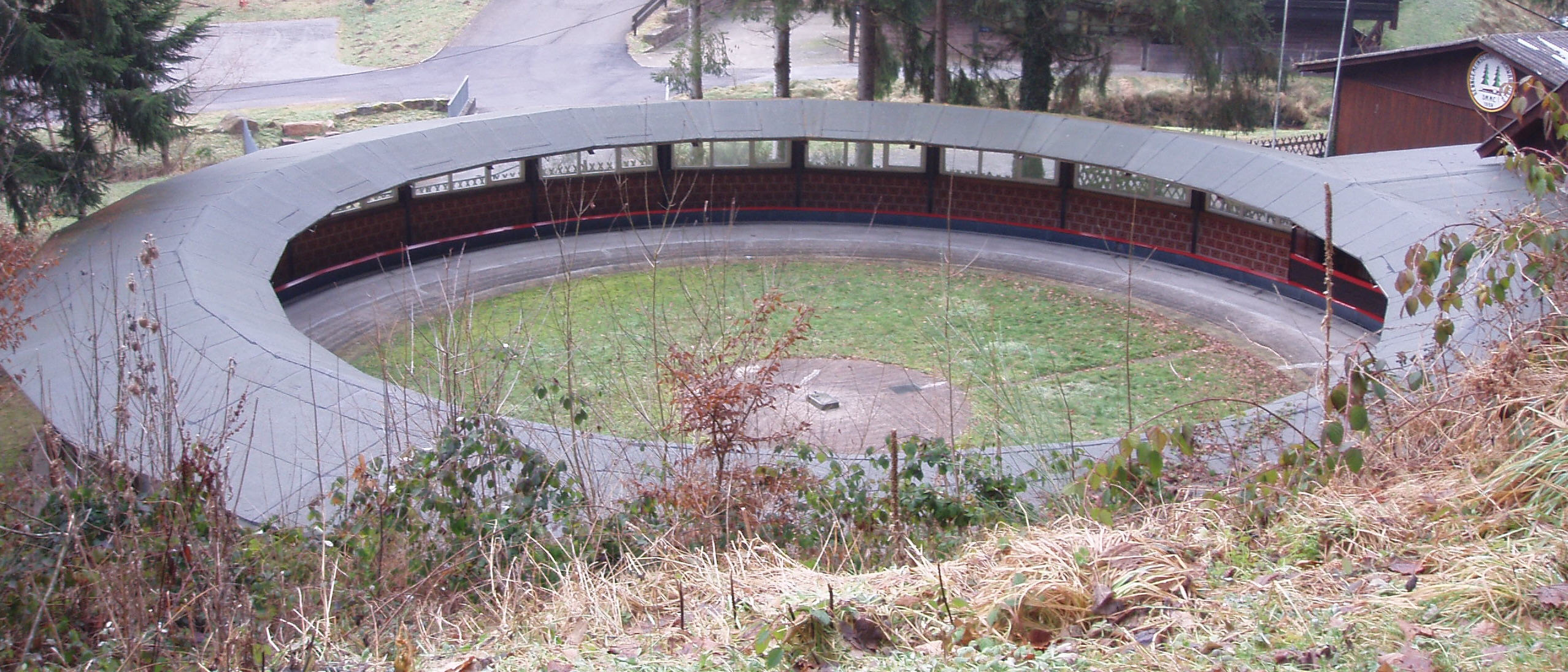 Speedrennbahn Kapfenhardt